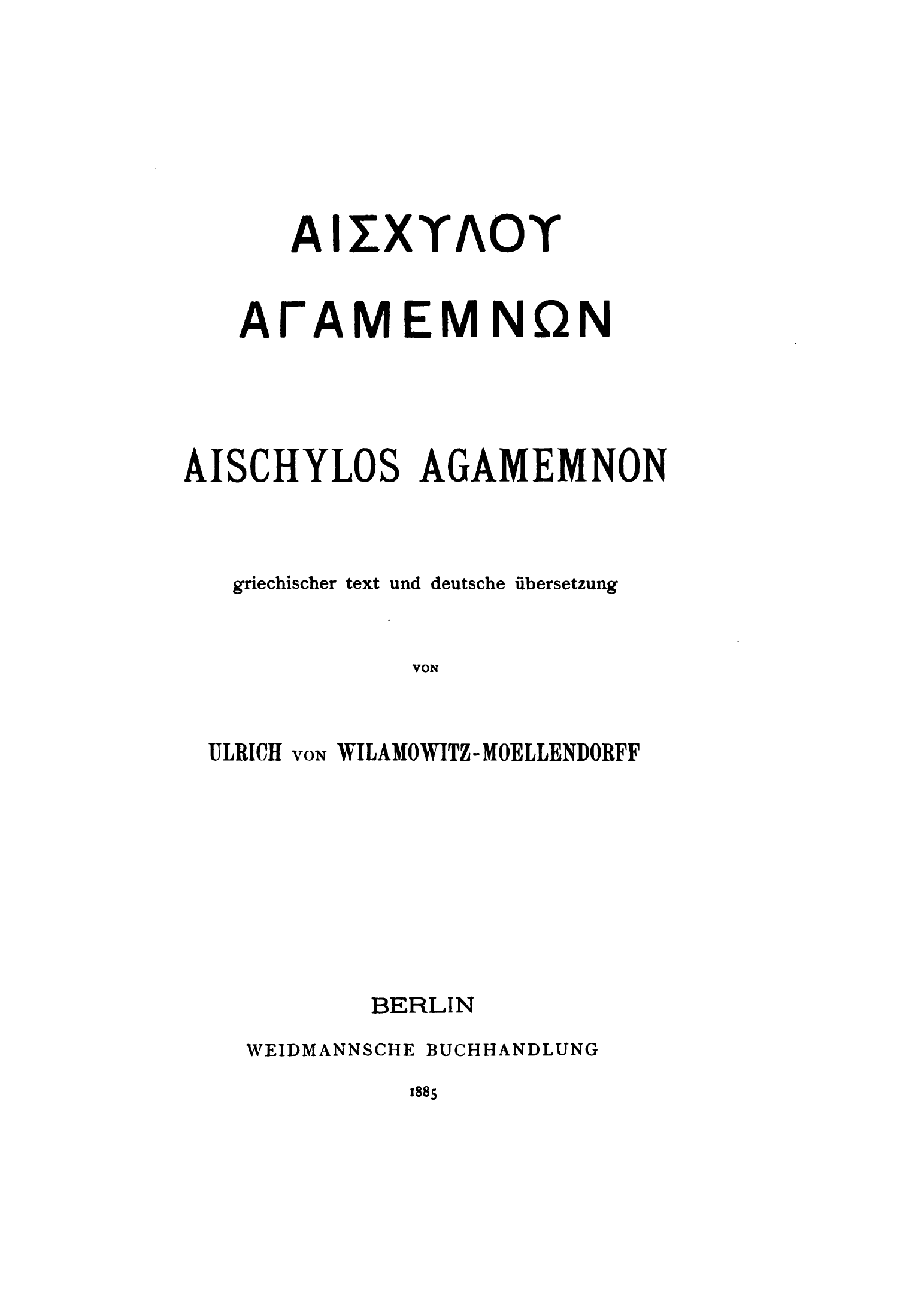 εξωφυλλο